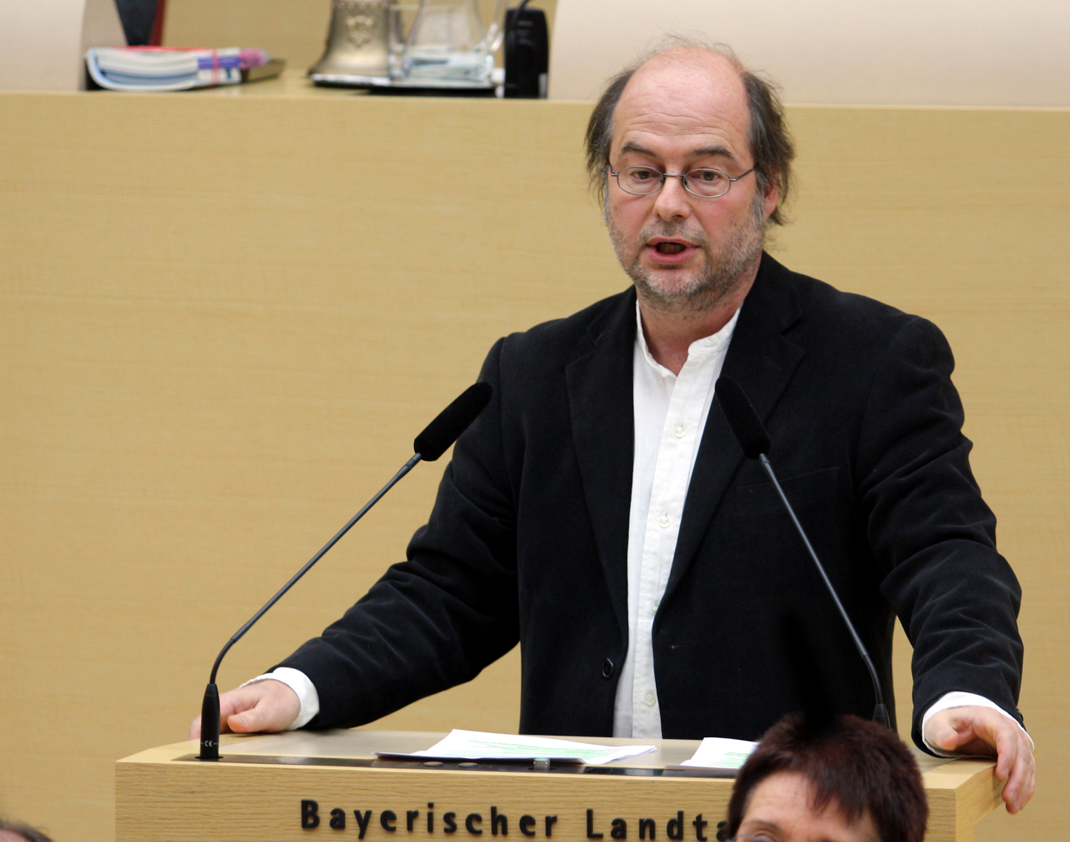 Eike Hallitzky, bayerischer Politiker (Bündnis 90/Die Grünen) und Mitglied des Bayerischen Landtages. Hier am 14.02.2012 während einer Rede im Bayerischen Landtag (Maximillianeum, Plenarsaal).